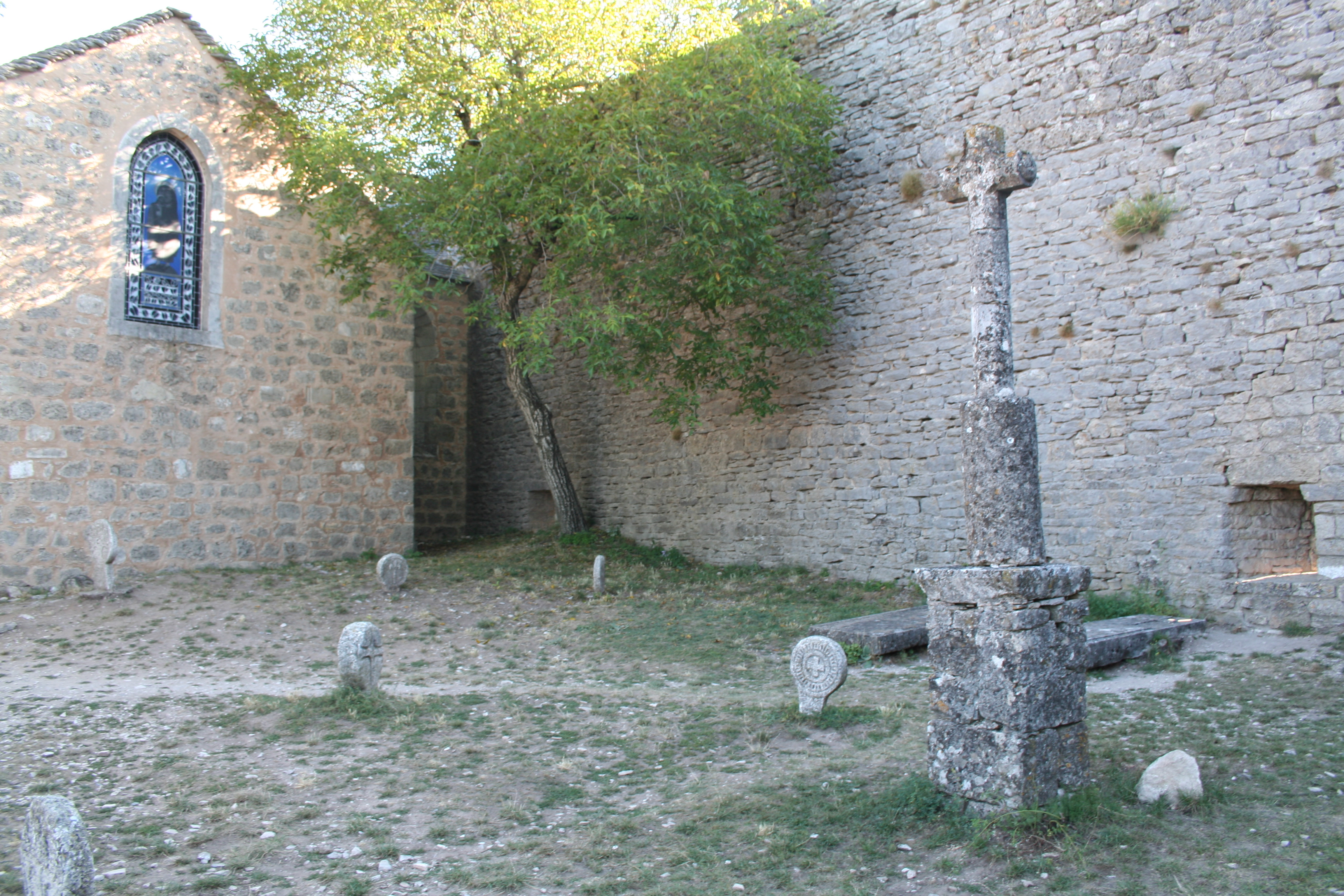 La Couvertoirade (Aveyron) - cimetière.